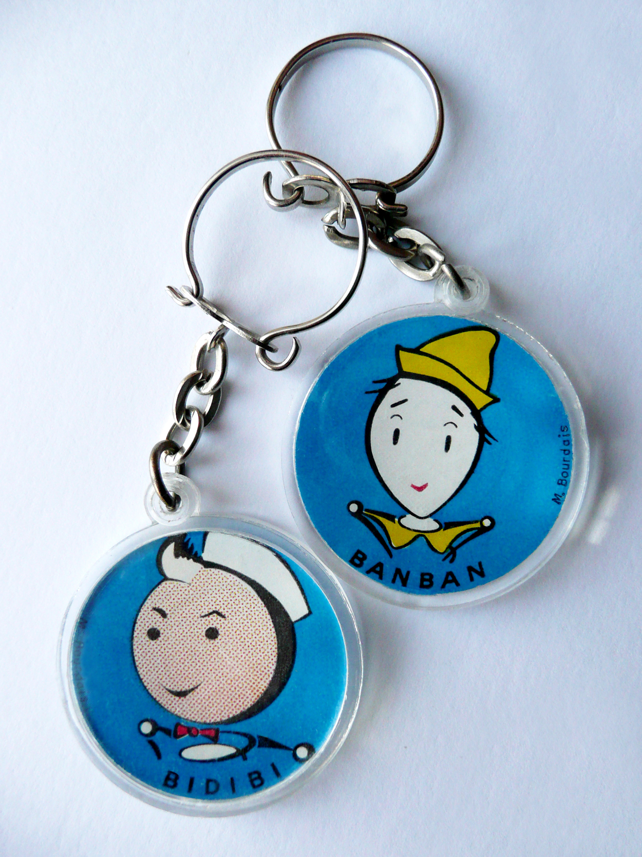 Porte-clés représentant les deux héros des Aventures de Bidibi et Banban, dessinés par Michel Bourdais, et parus en 1965 à la grande époque de la copocléphilie.